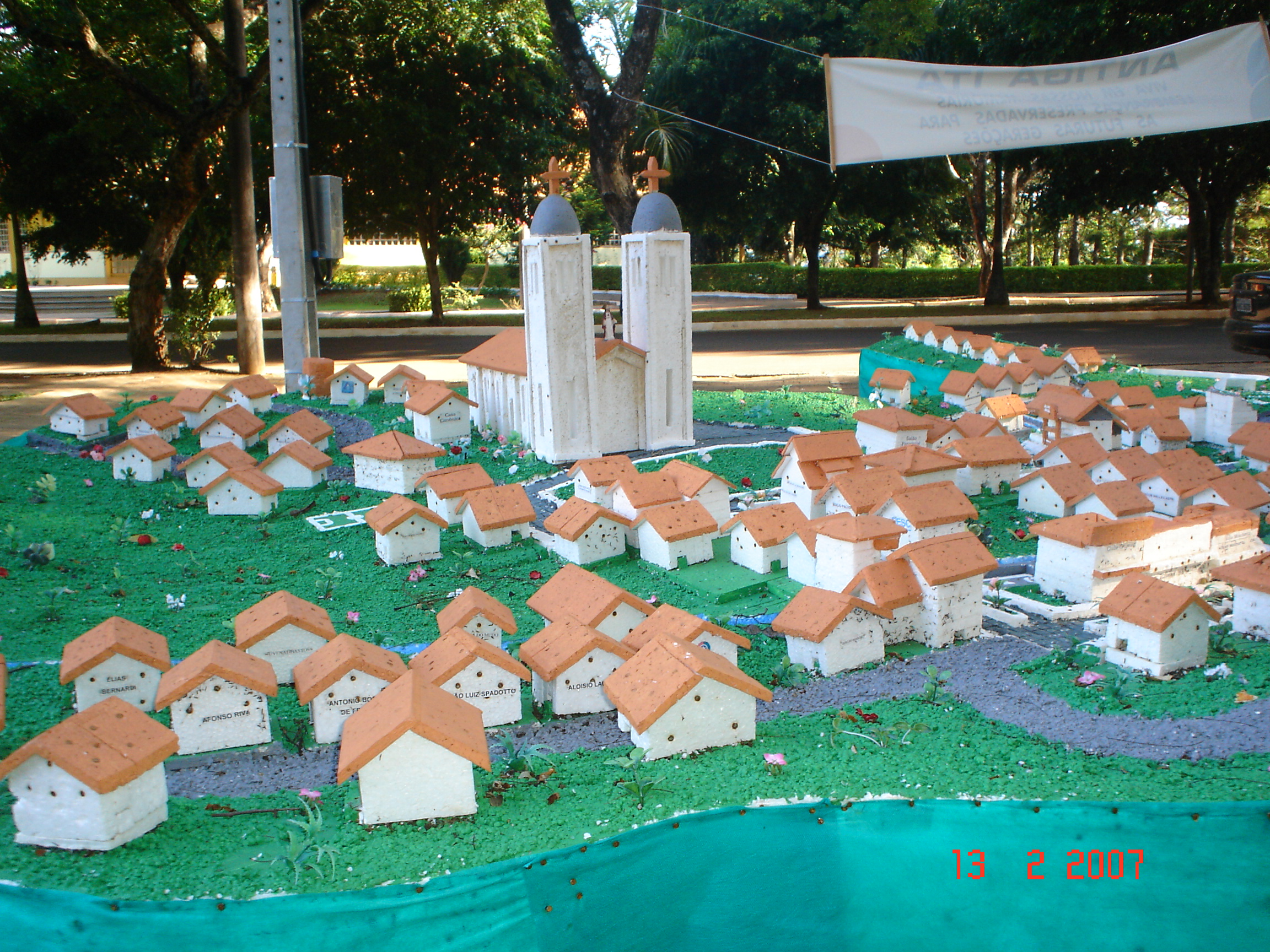 Maquete de antiga cidade de Itá, Santa Catarina, Brasil.